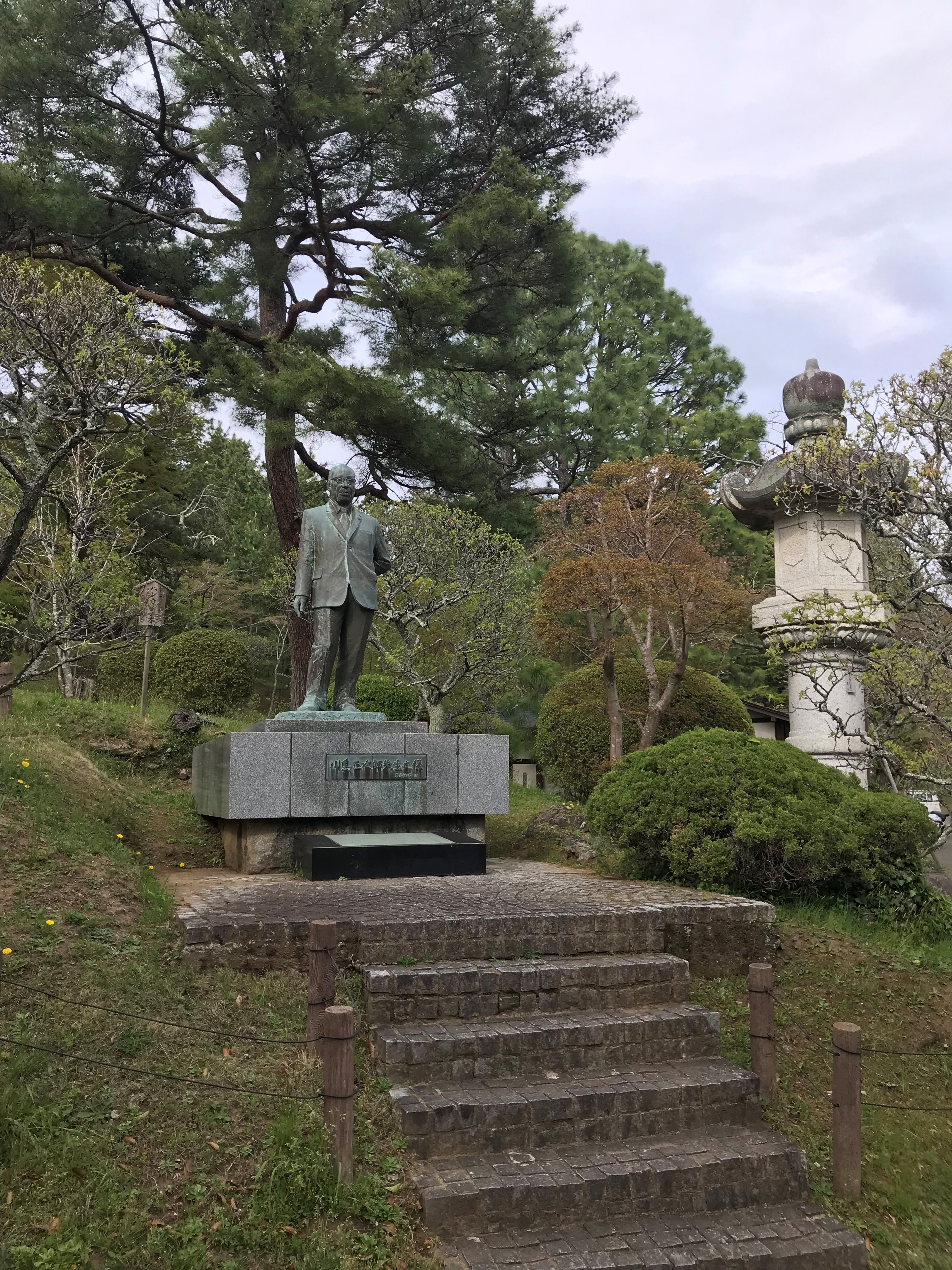 2018年4月成田山新勝寺境内で撮影